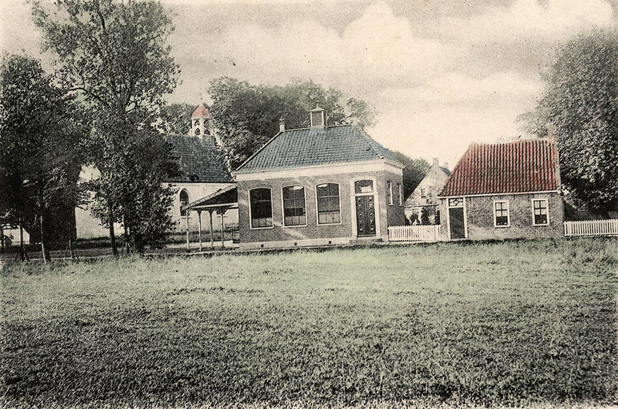 Uitsnede van een foto van de kerk, het schooltje en de meesterswoning van Breede.